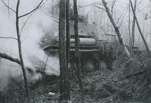 Танк КВ-1 ведёт бой в лесу. Западный фронт, 9-я танковая бригада. Машина выпуска Челябинского Кировского завода.